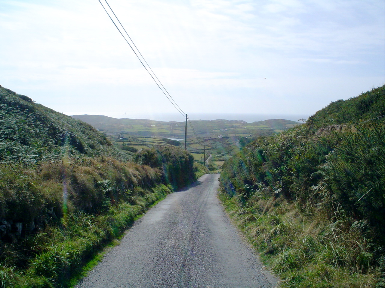 Cape Clear road